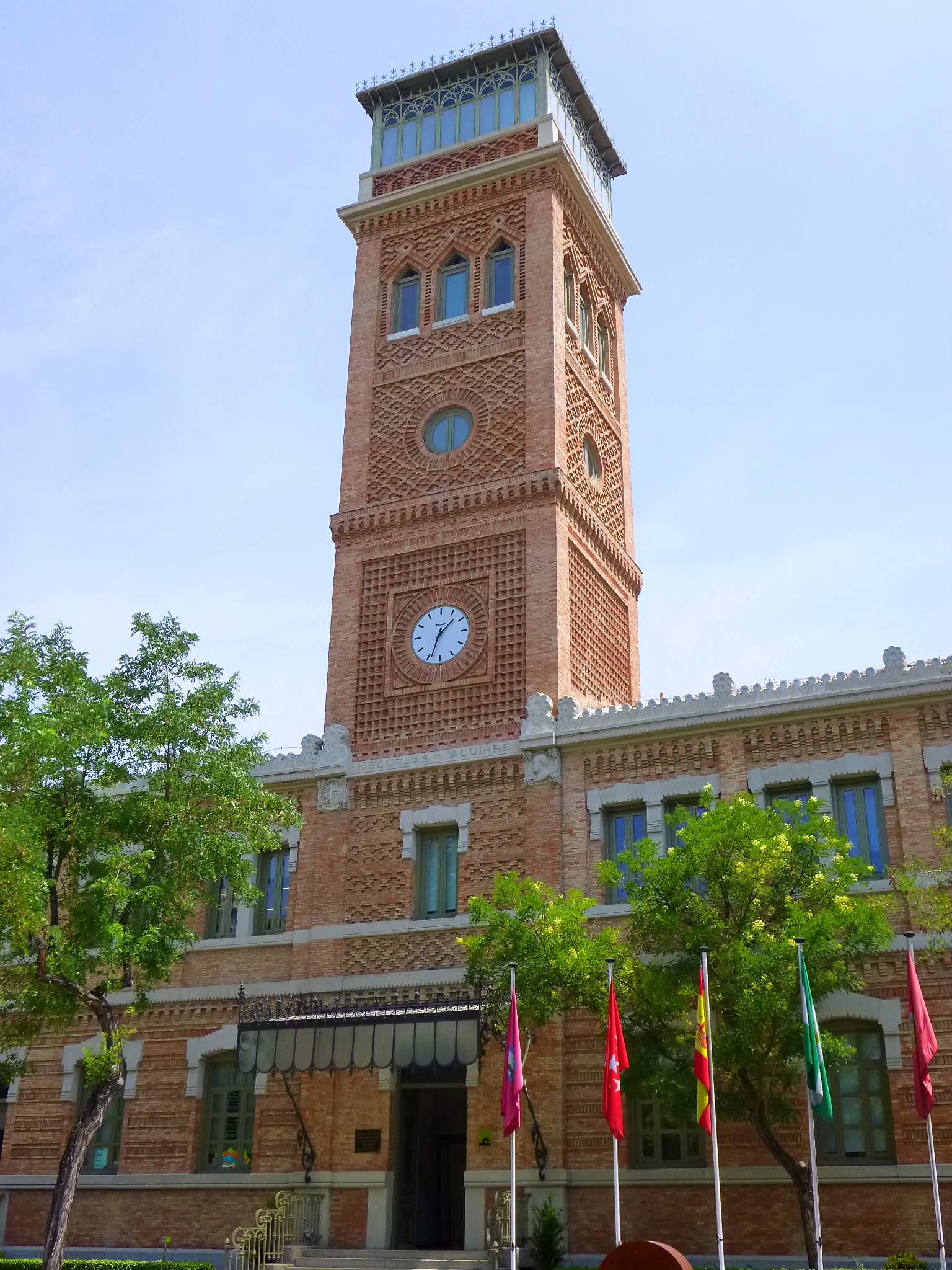 Casa Árabe e Instituto Internacional de Estudios Árabes y del Mundo Musulmán (Madrid)